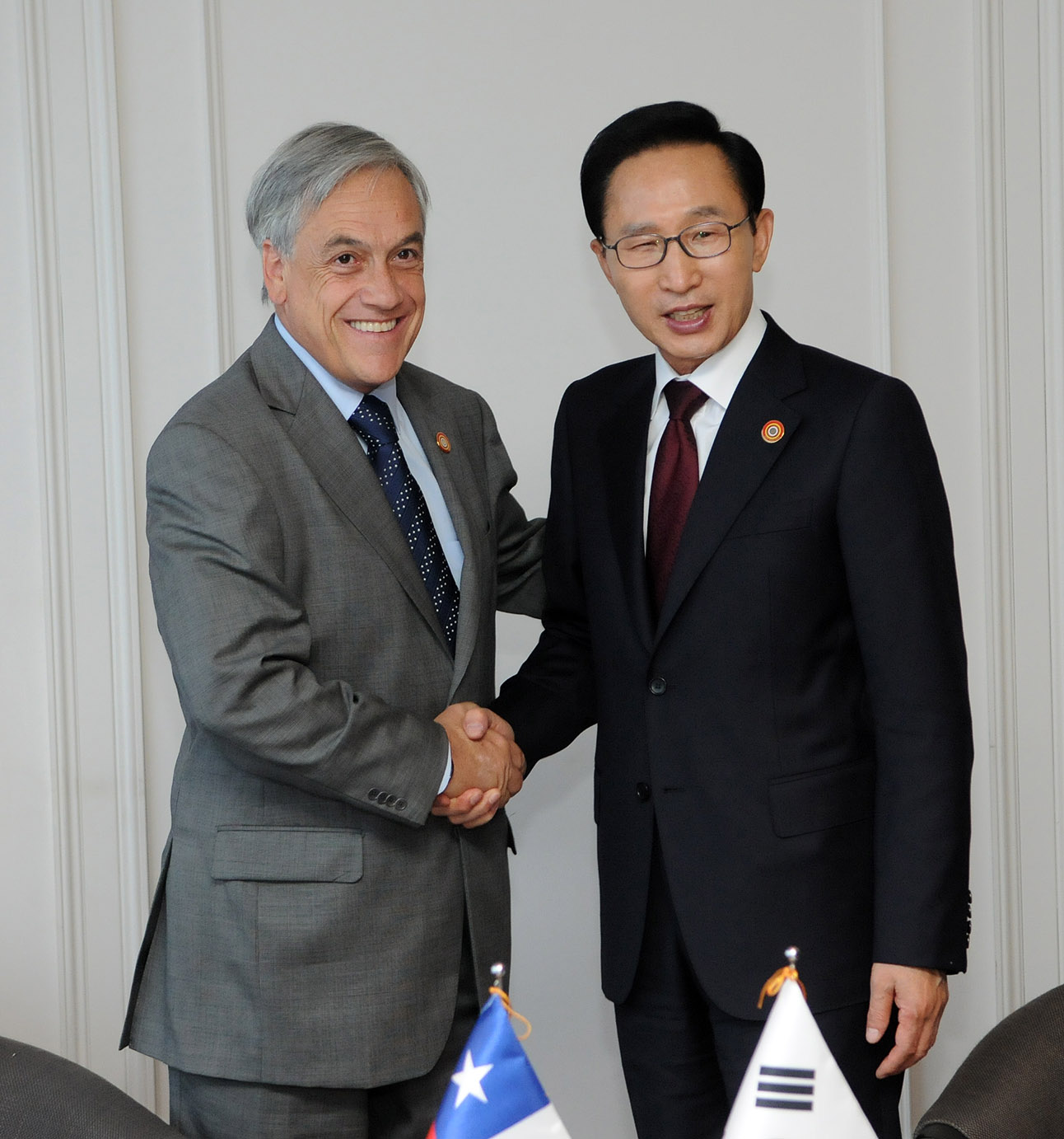 El Presidente de la República , Sebastián Piñera, se reunió con el Presidente de la República de Corea del Sur, Lee Myung-bak, en el marco de la XVIII Cumbre de Líderes de APEC.